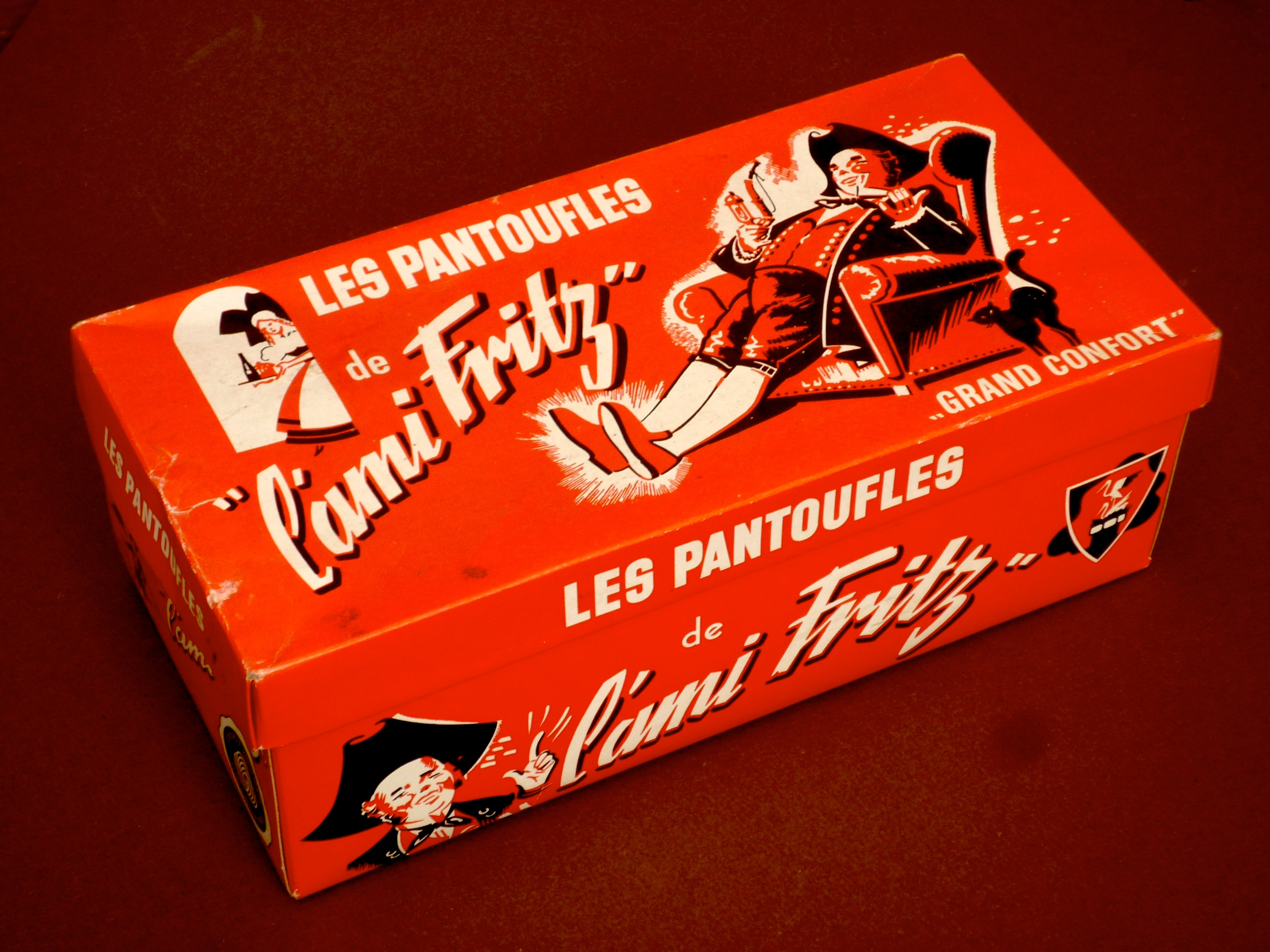 Boite d’emballage des pantoufles de l’Ami Fritz produites à Wasselonne par les Ets Amos.